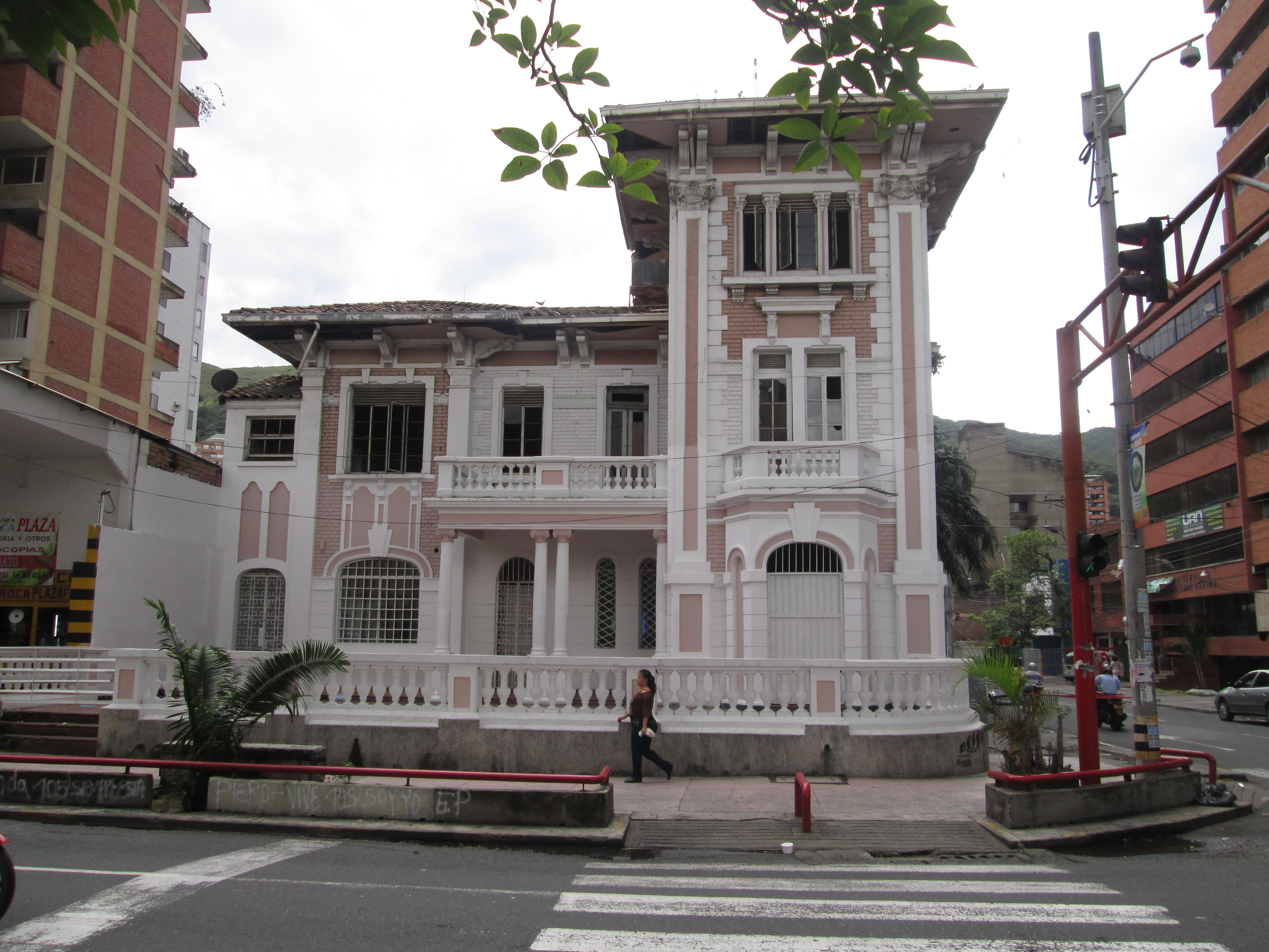 Casa Borrero en el barrio Granada.